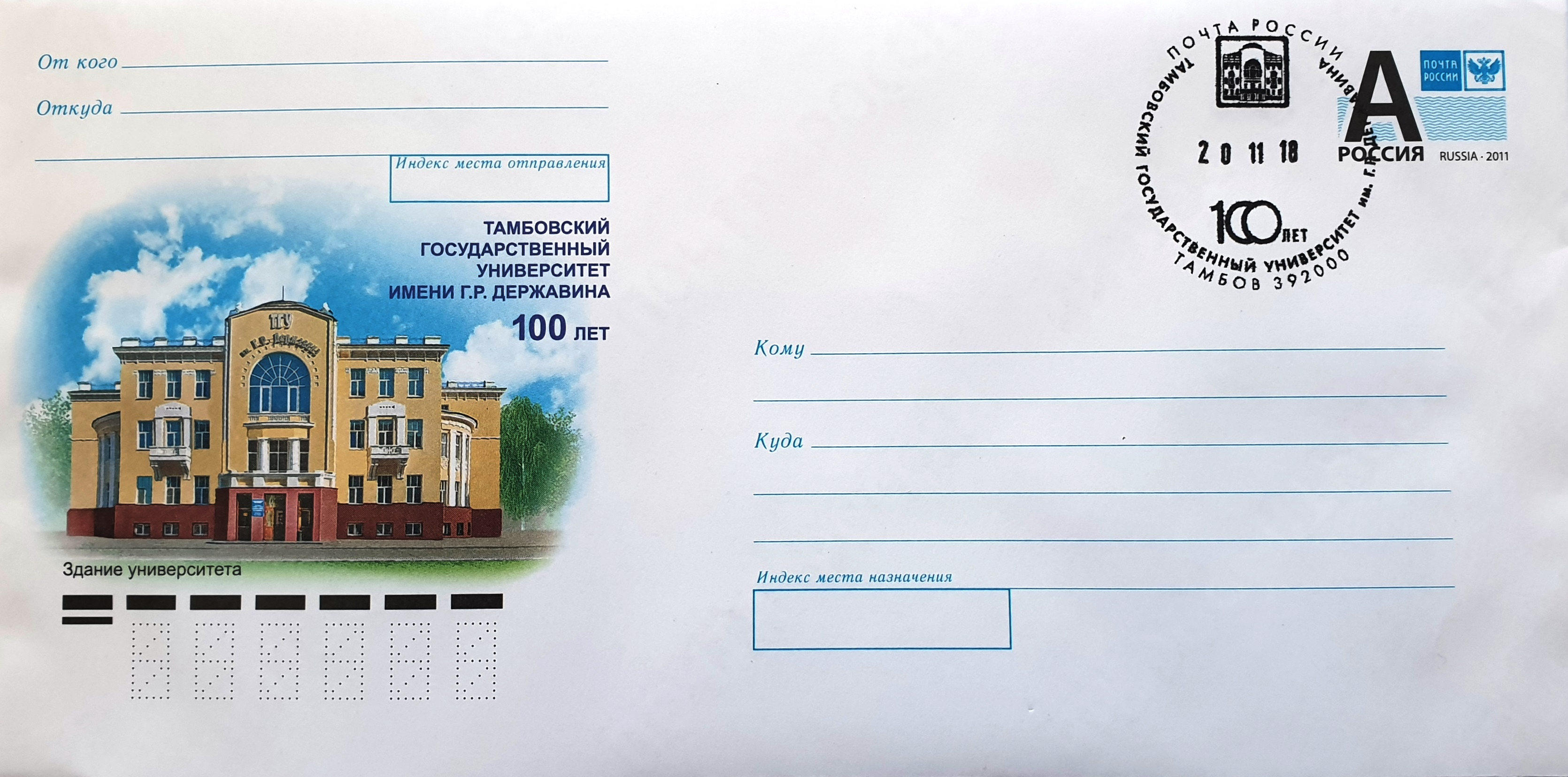 Почтовый конверт выпущенный к 100 летию Тамбовского государственного университета имени Г.Р. Державина